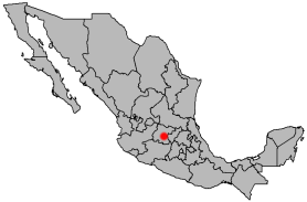 Locator map of Celaya, Guanajuato, Mexico